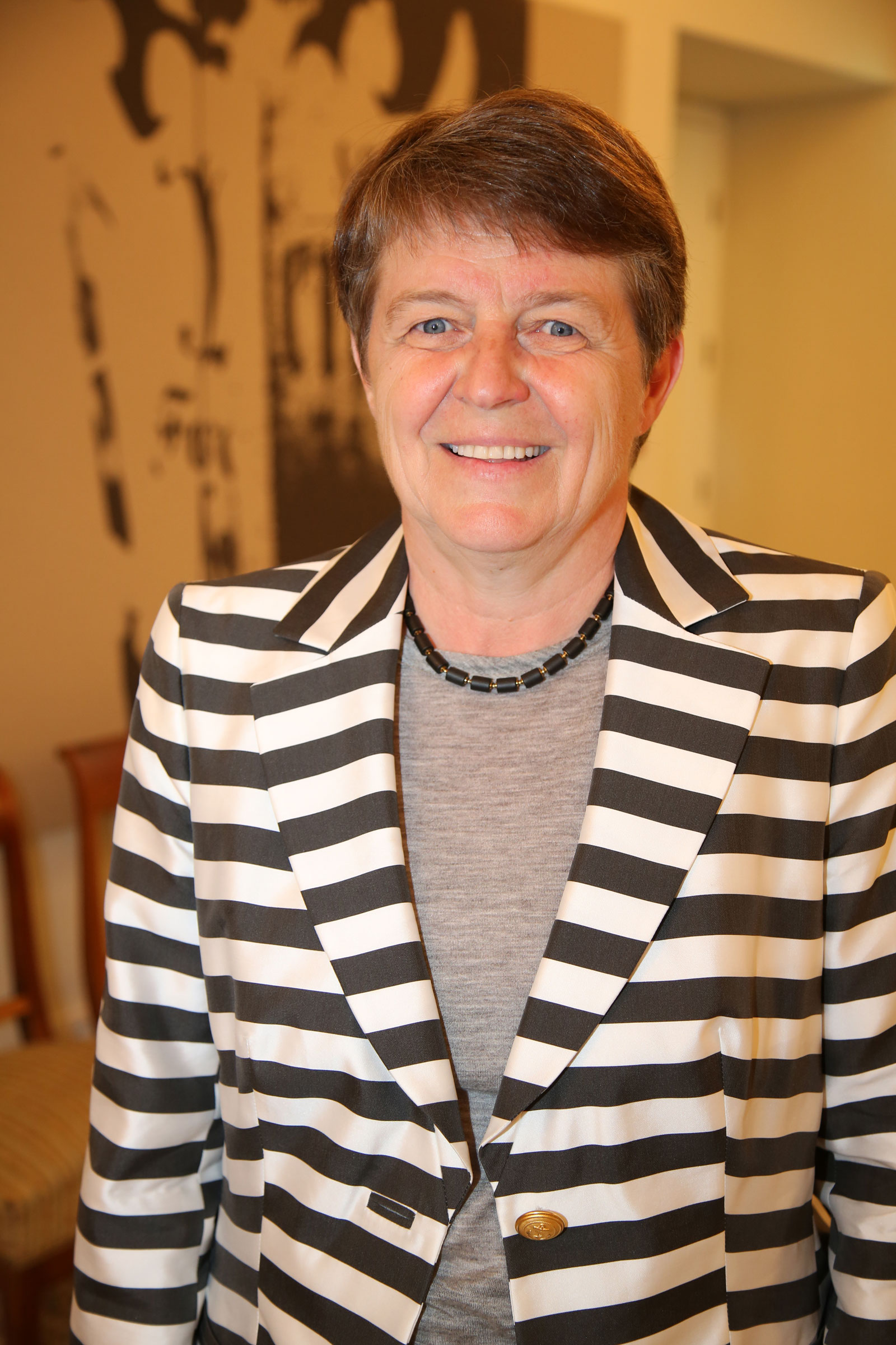 Ederer_Brigitte-7215